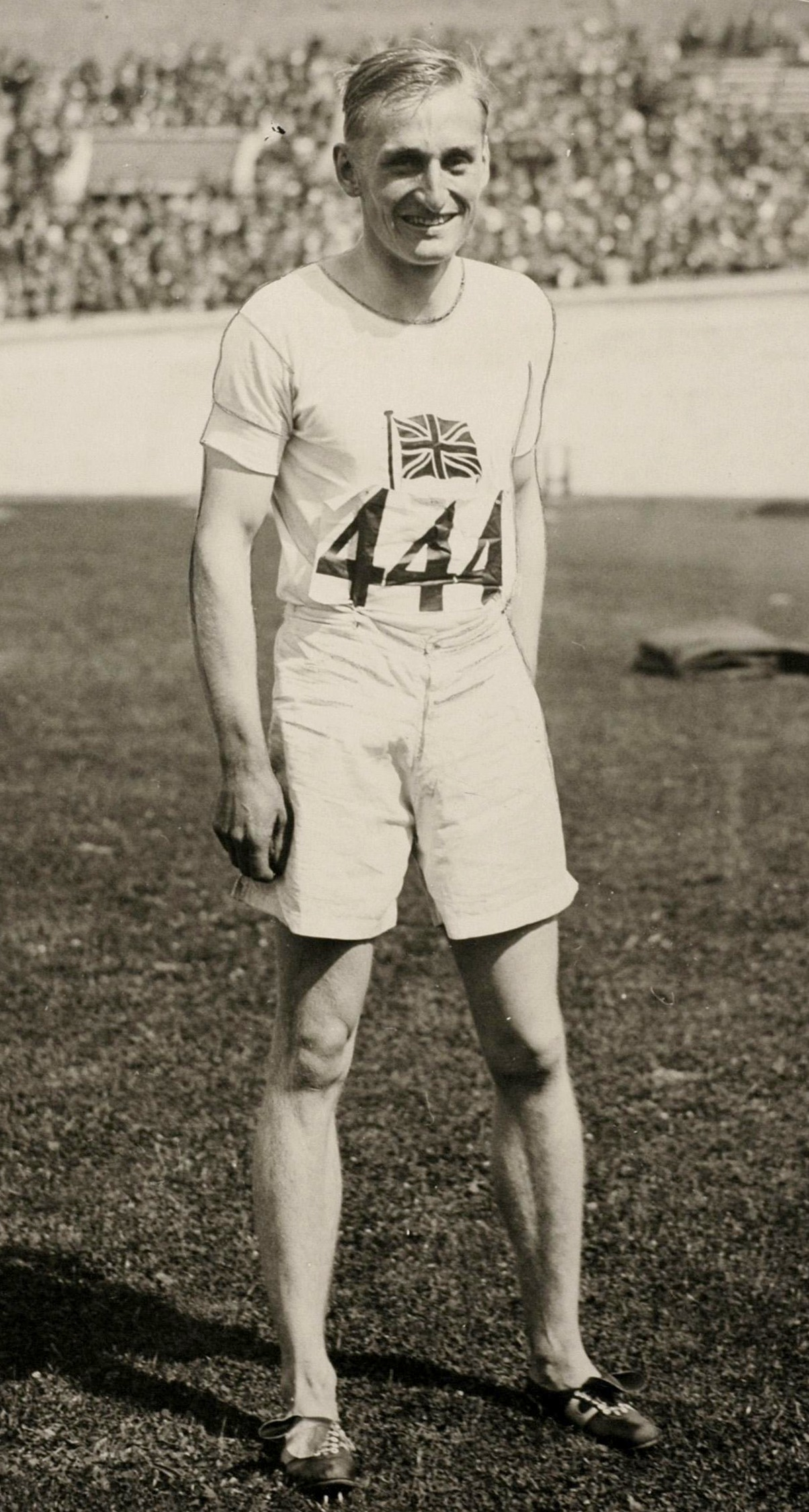 Sport. Olympische Spelen 1928 Amsterdam, Nederland : De Brit Lord Burghley, olympisch kampioen op de 400 m horden.